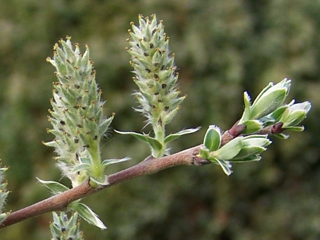 Salix repens (pl. wierzba płożąca)